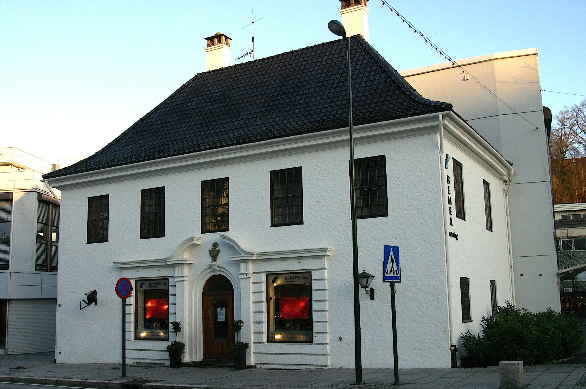 Nestun Apotek tegnet av Per Grieg Photo: Nina Aldin Thune